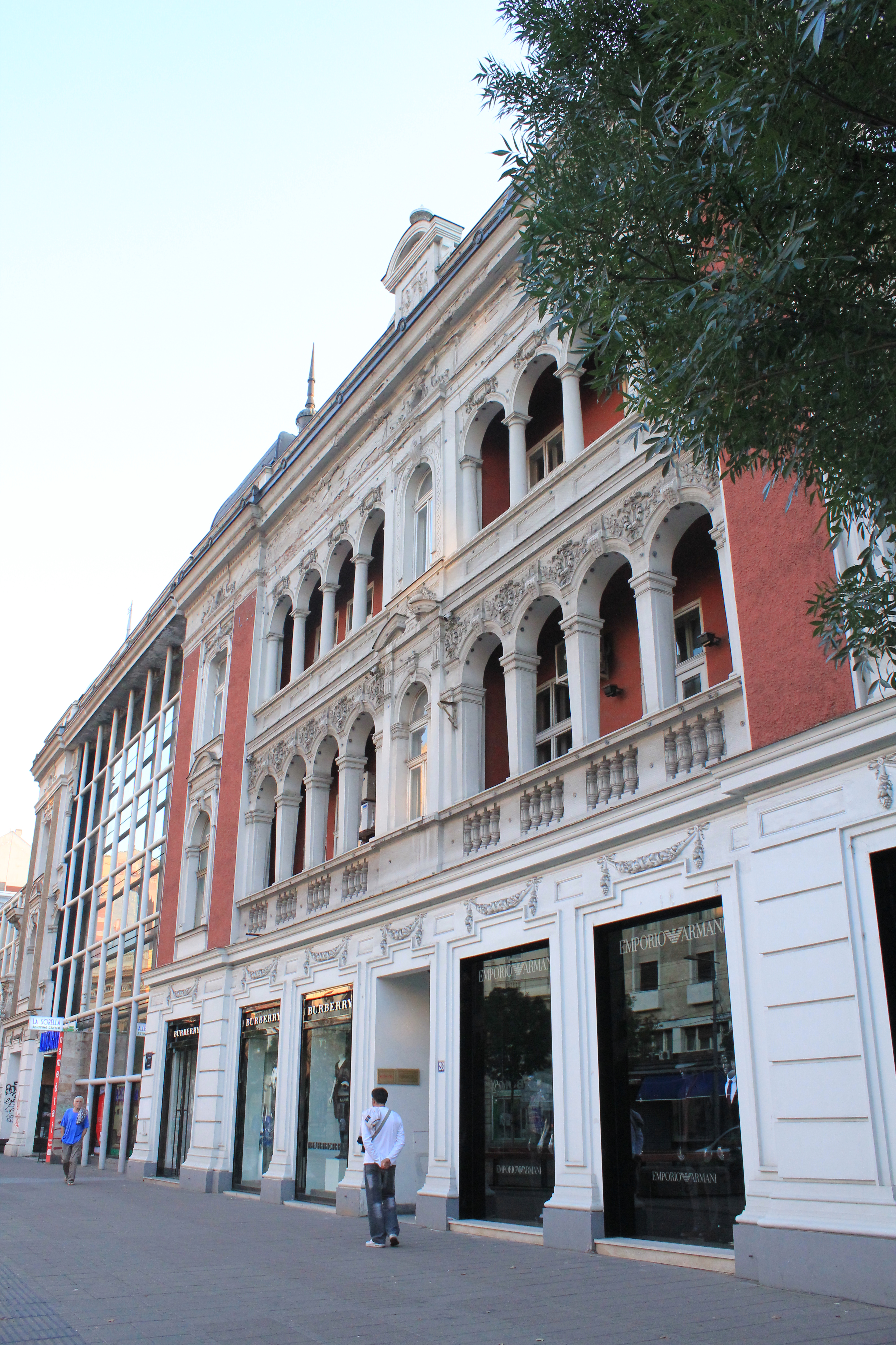 Palata „Atina“